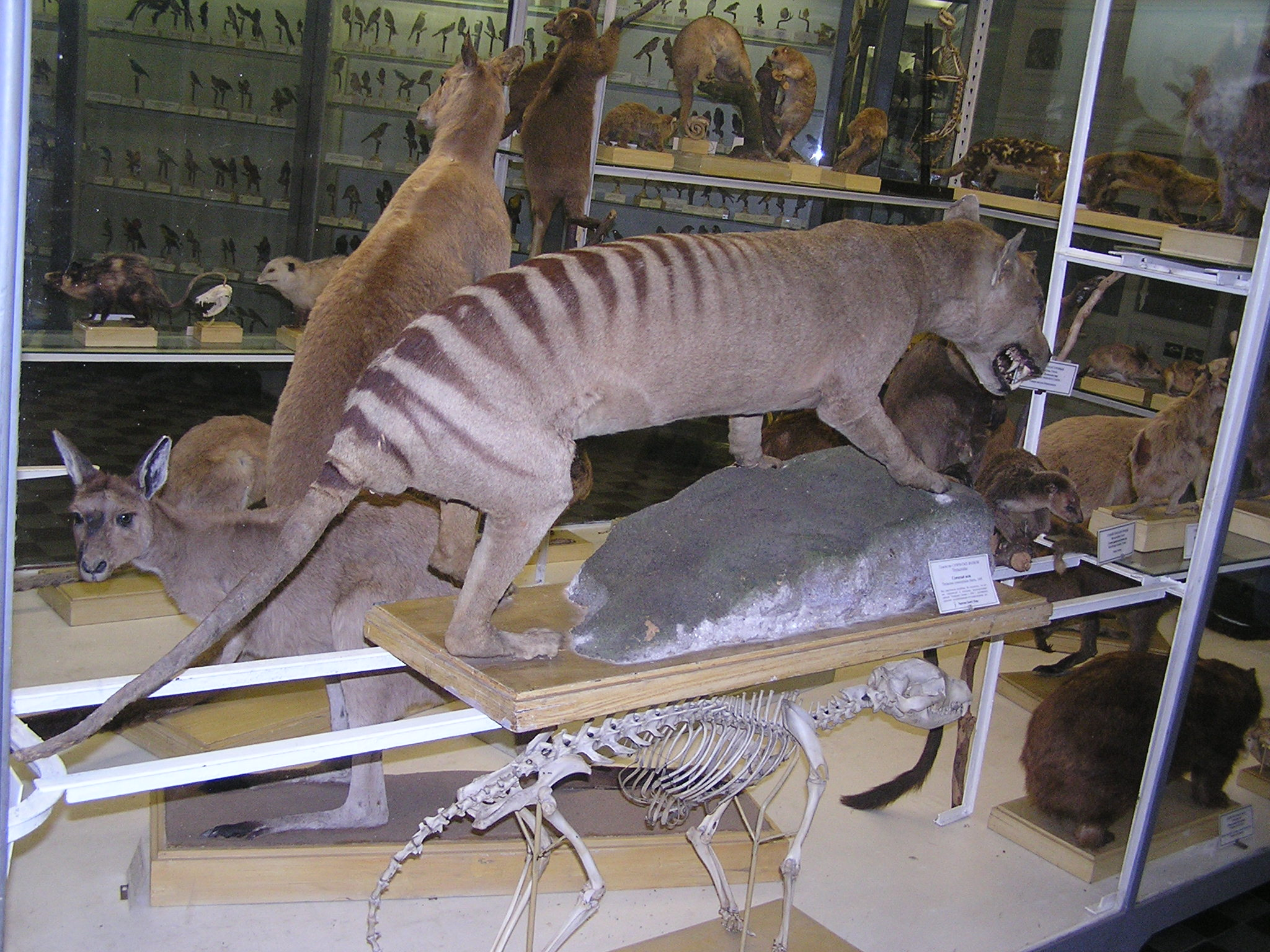 Зоологический музей в Санкт-Петербурге. Сумчатый волк